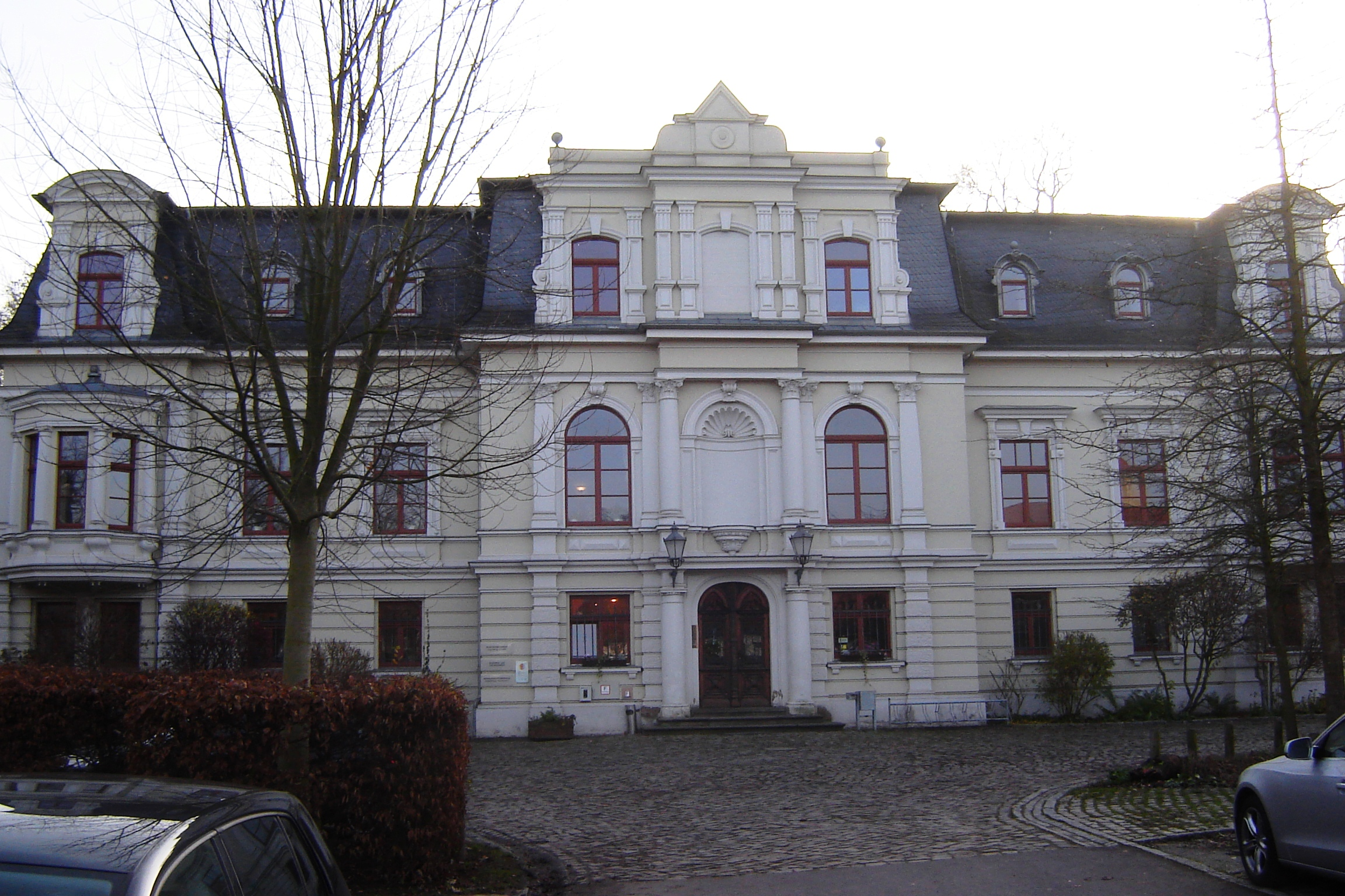 Magdeburg, Villa Böckelmann, Nordfassade